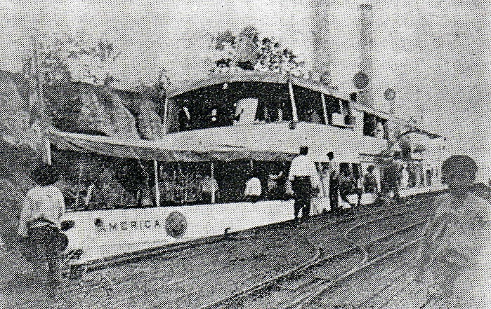 BAP America el 10 de julio de 1911